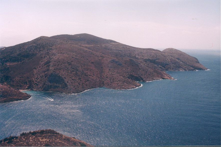 Auteur Vincent C. Côte Est de Syros